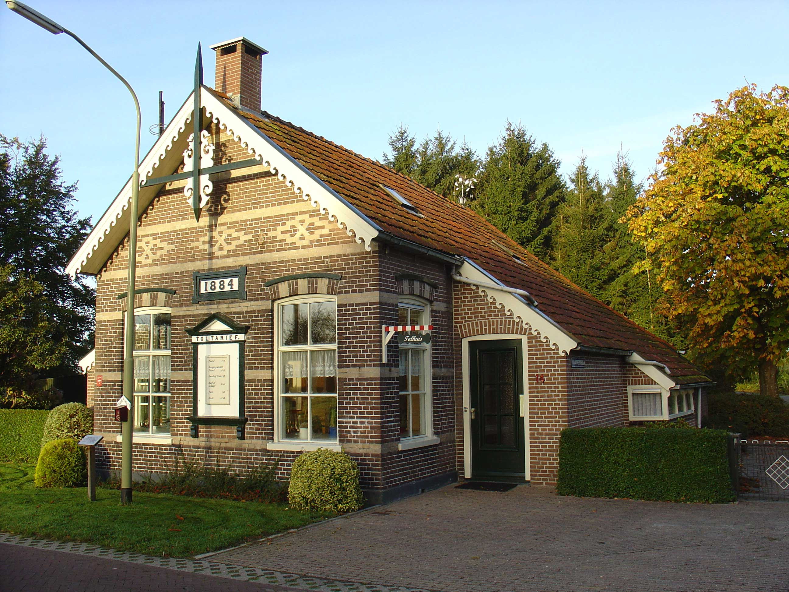 Tolhuis Rodenwolderweg Foxwolde